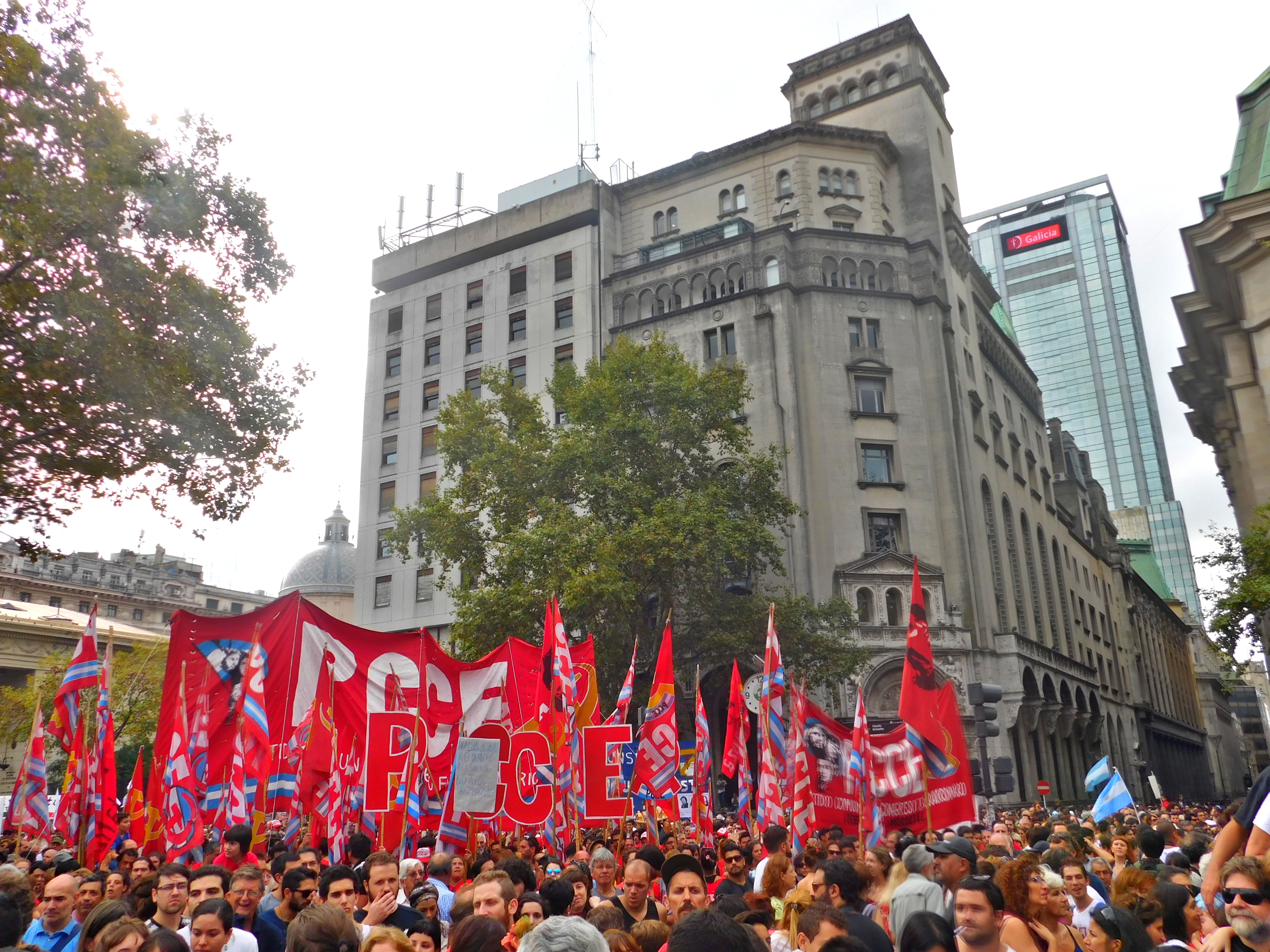 El Partido Comunista Congreso Extraordinario participando del Día de la Memoria de 2016.